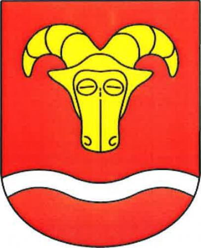 Třebosice znak